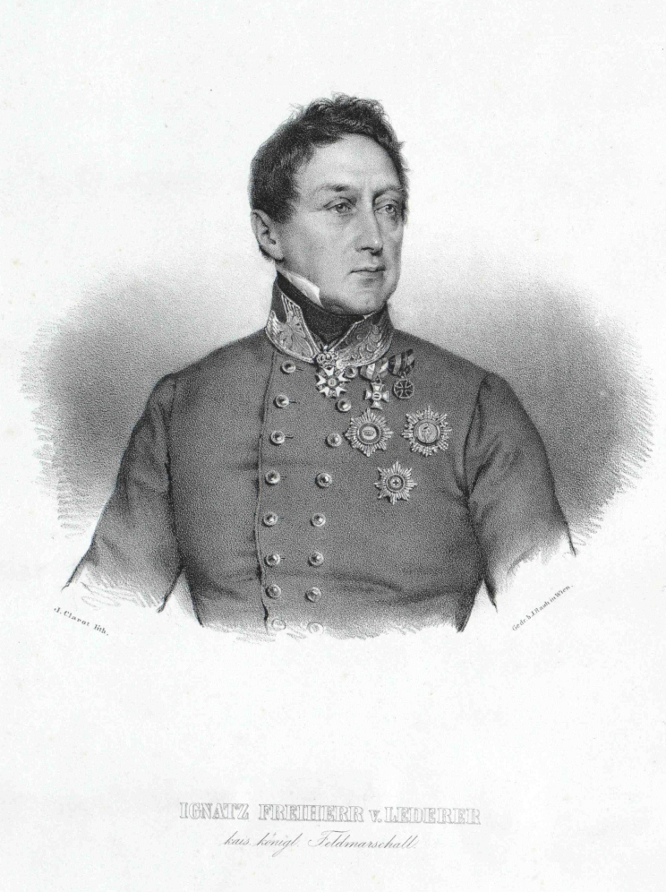 Lederer, Ignaz Freiherr (1769 - 1849)